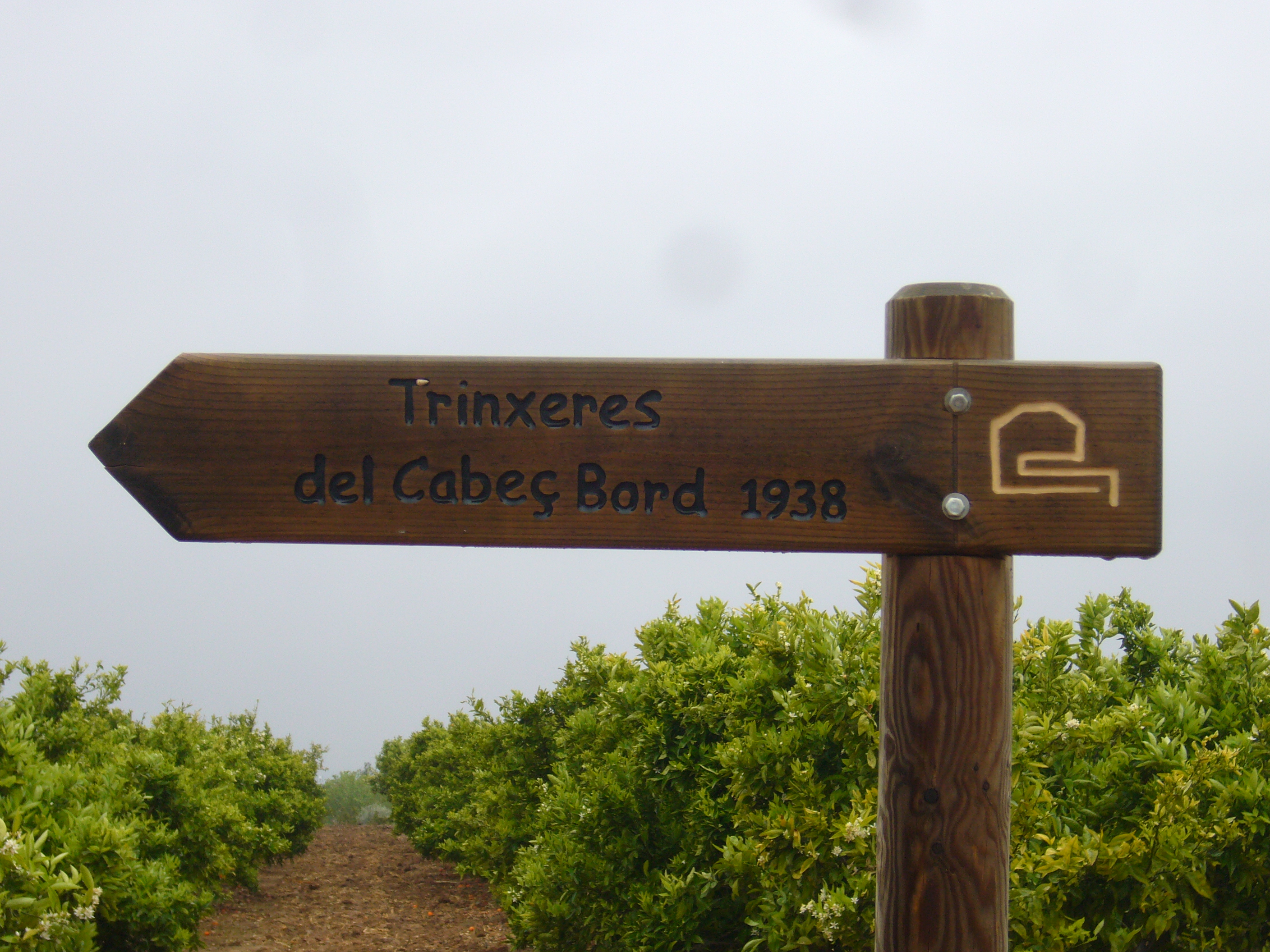 Senyal trinxeres Cabeç Bord a Nàquera